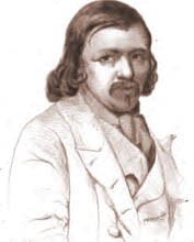 Portrait du fabuliste et goguettier Pierre Lachambeaudie (1806-1872)